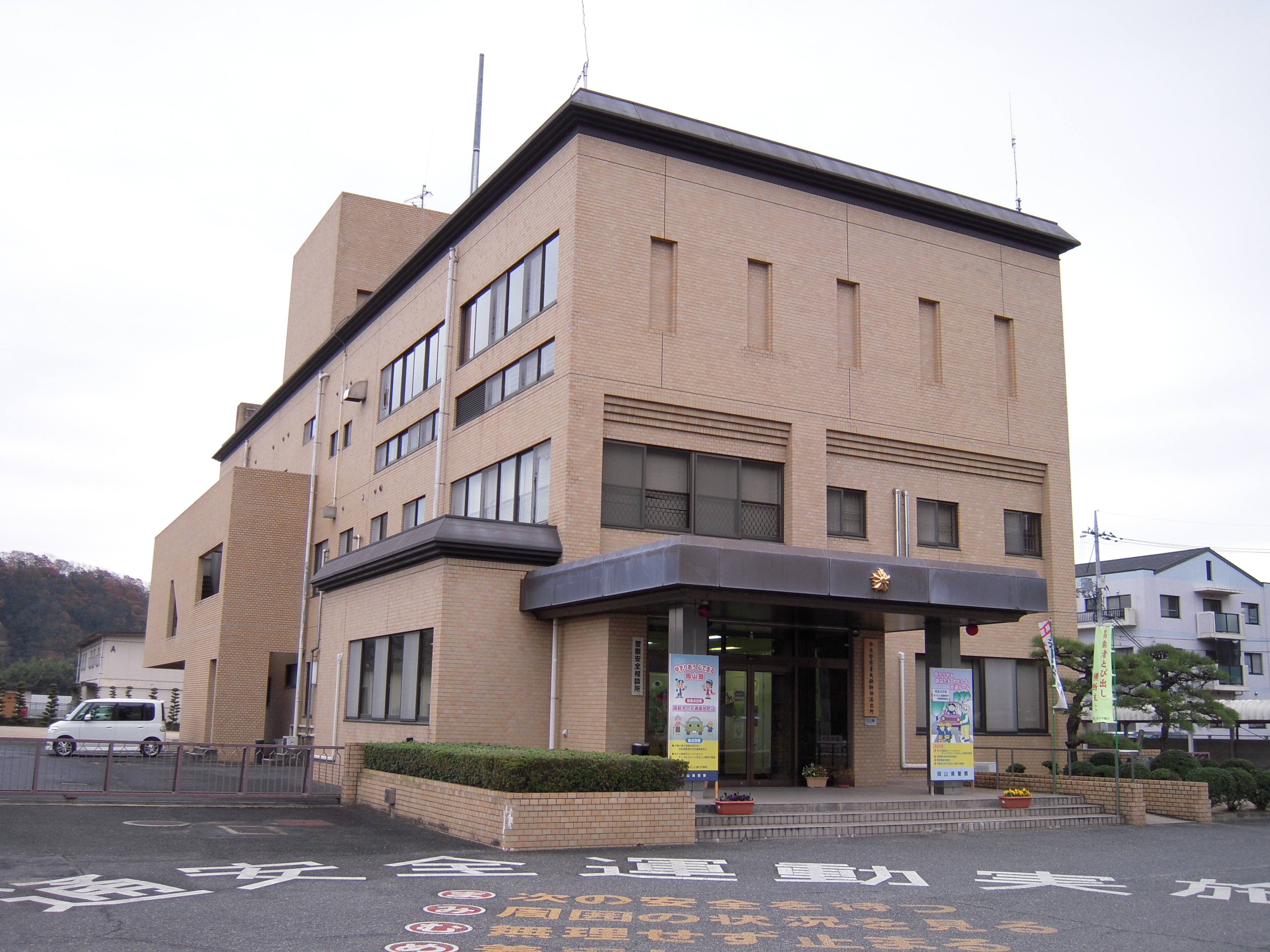 矢掛幹部派出所の外観